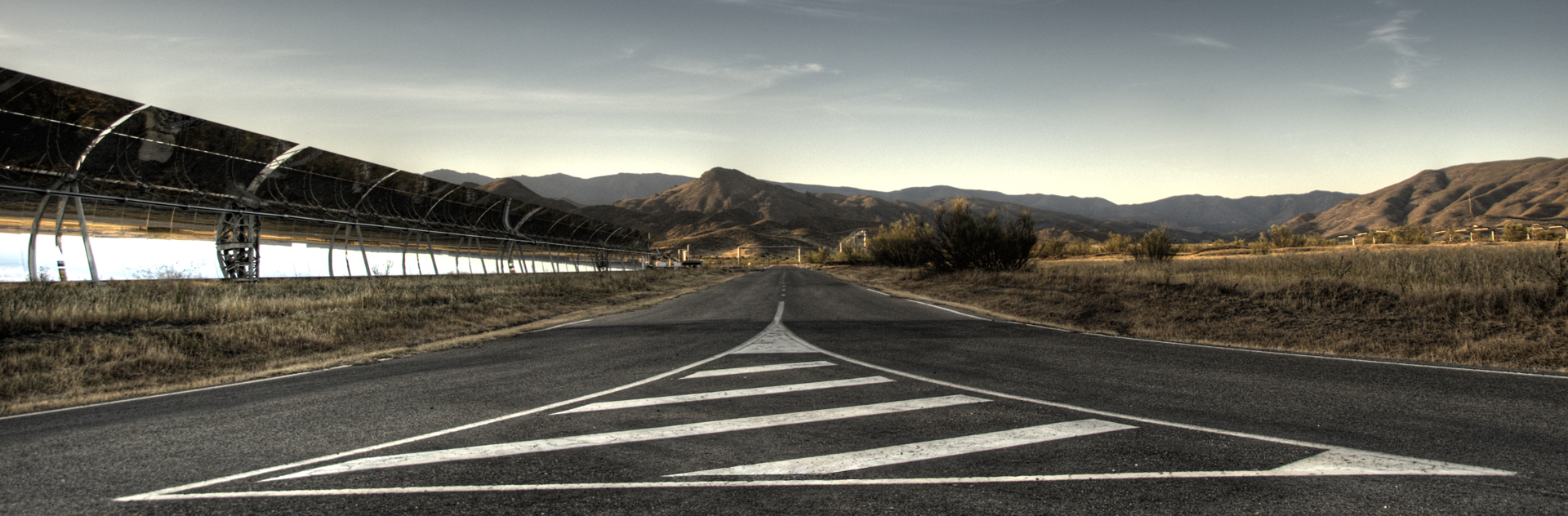 Plataforma Solar de Almeria, Spain